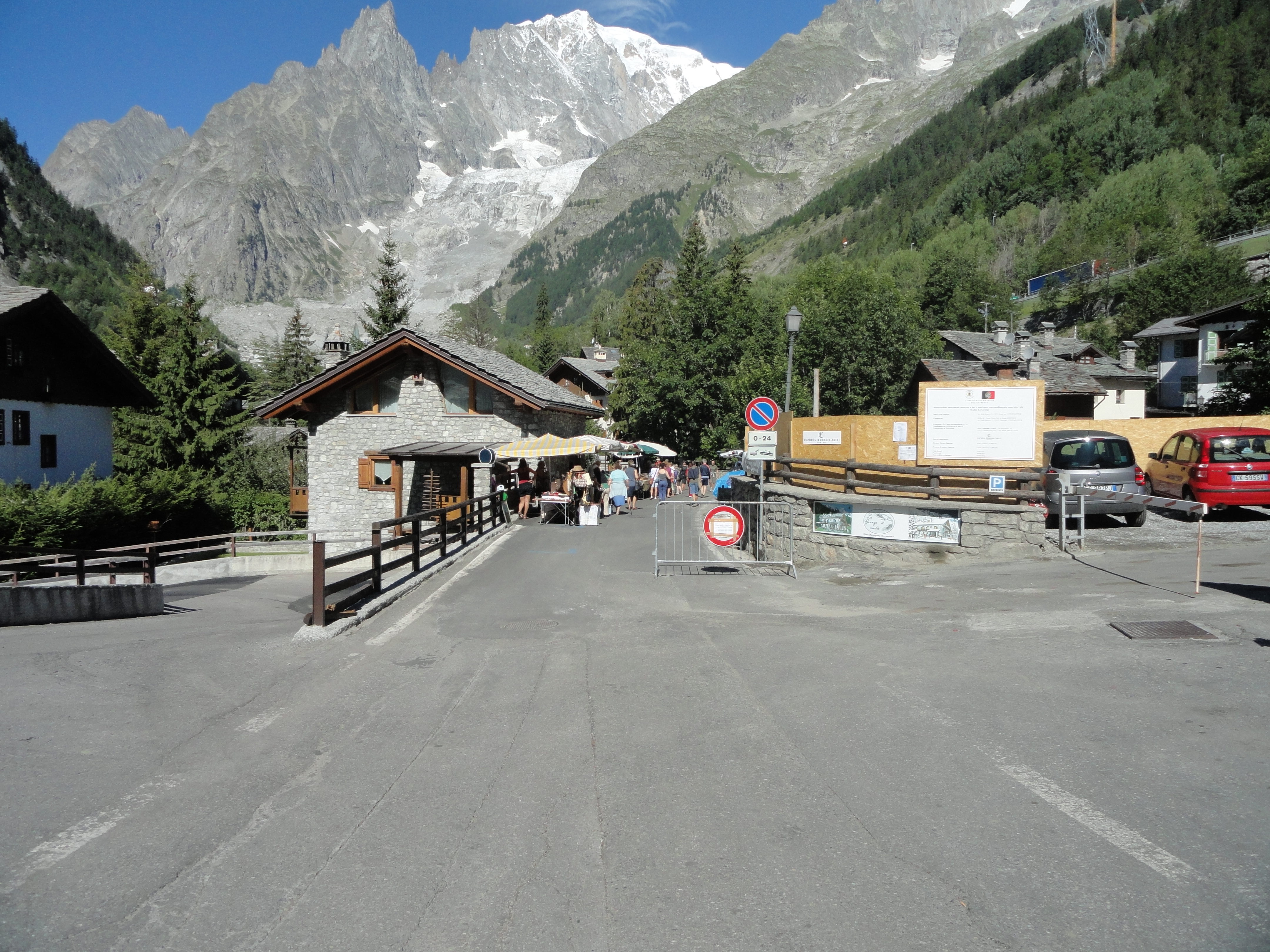 Il centro di Entréves.